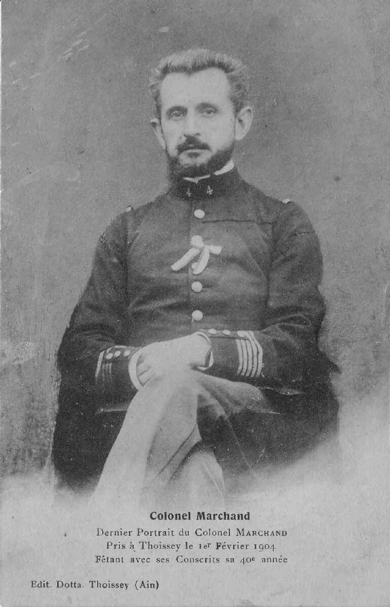 Dernier portrait du Colonel Marchand, pris à Thoissey le 1er février 1904, fêtant avec ses conscrits sa 40e année.